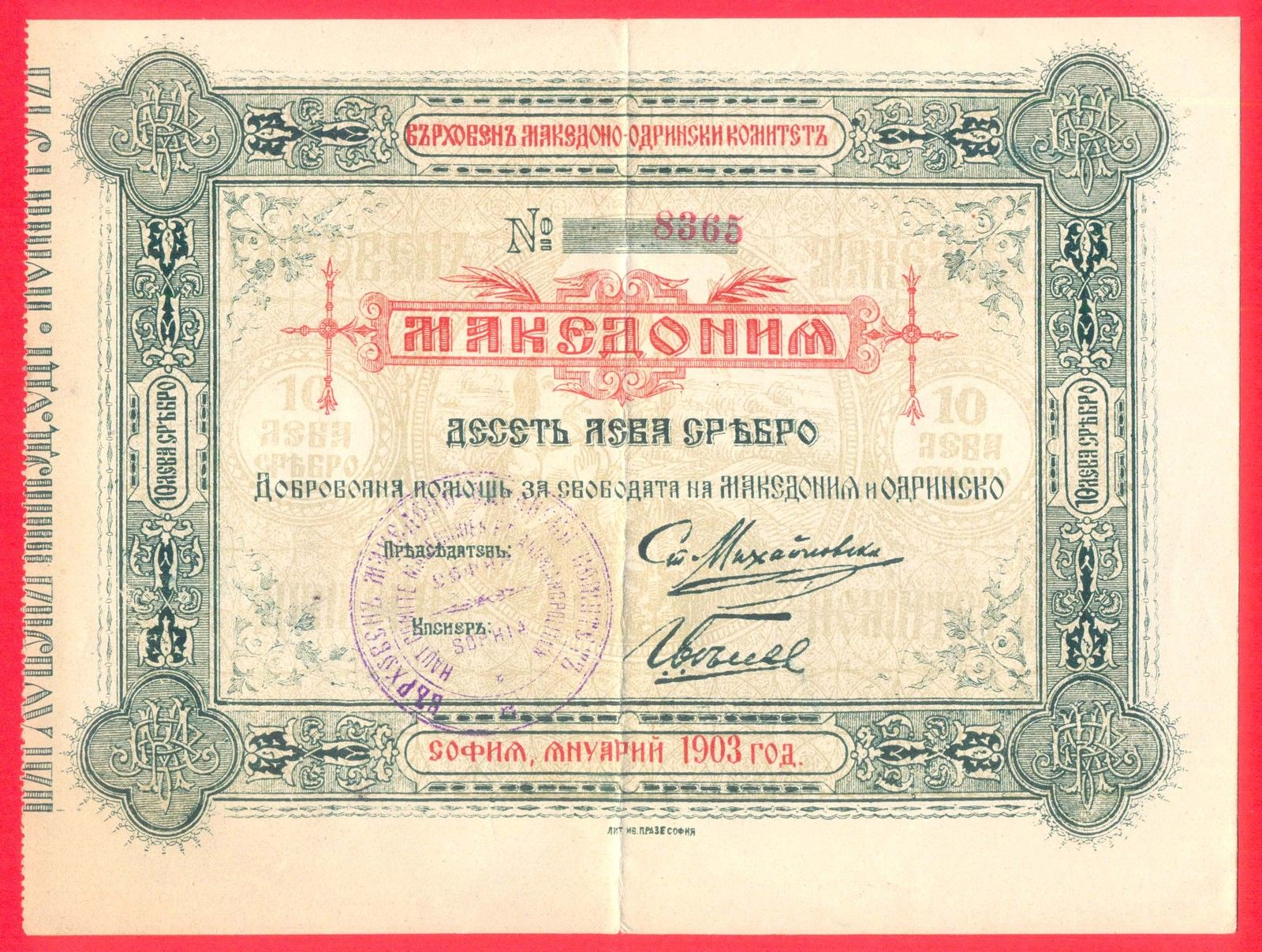 Облигация на ВМОК с подписите на Стоян Михайловски и Иван Цончев.